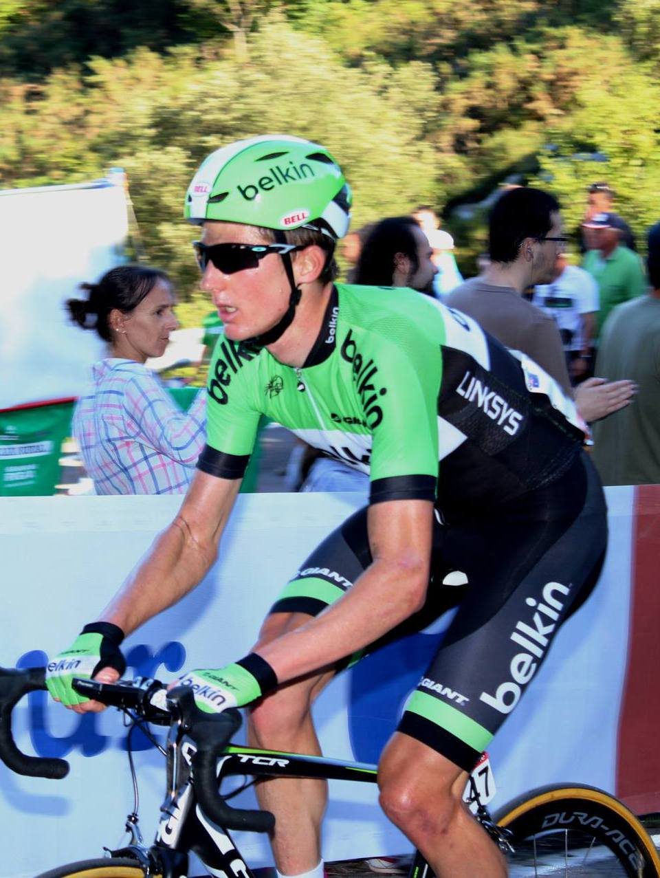 El ciclista australiano David Tanner, del Belkin Team, en plena ascensión a Peña Cabarga en la 18ª etapa de la Vuelta a España 2013